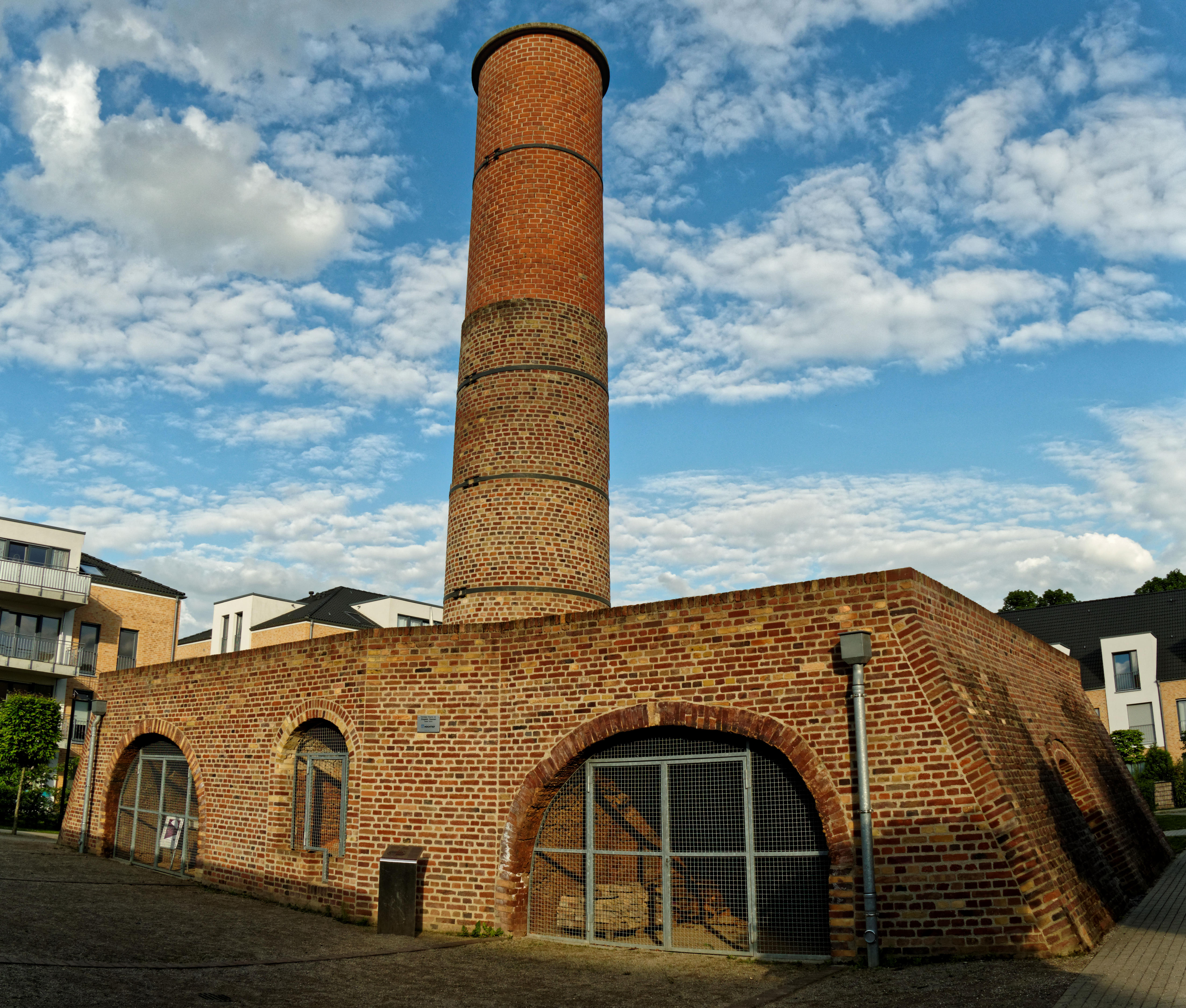 Blick von Nordwesten auf den Ringofen der ehem. Ziegelei Sassen in Gerresheim